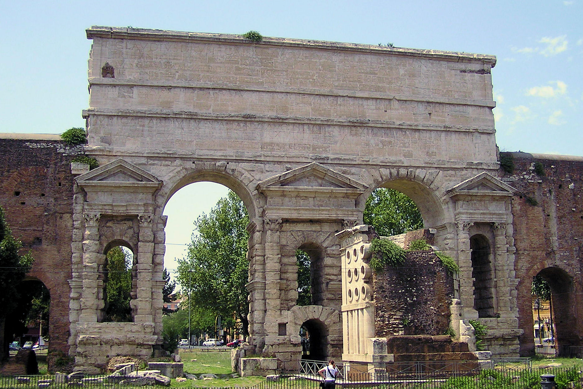 Porte majeure Rome